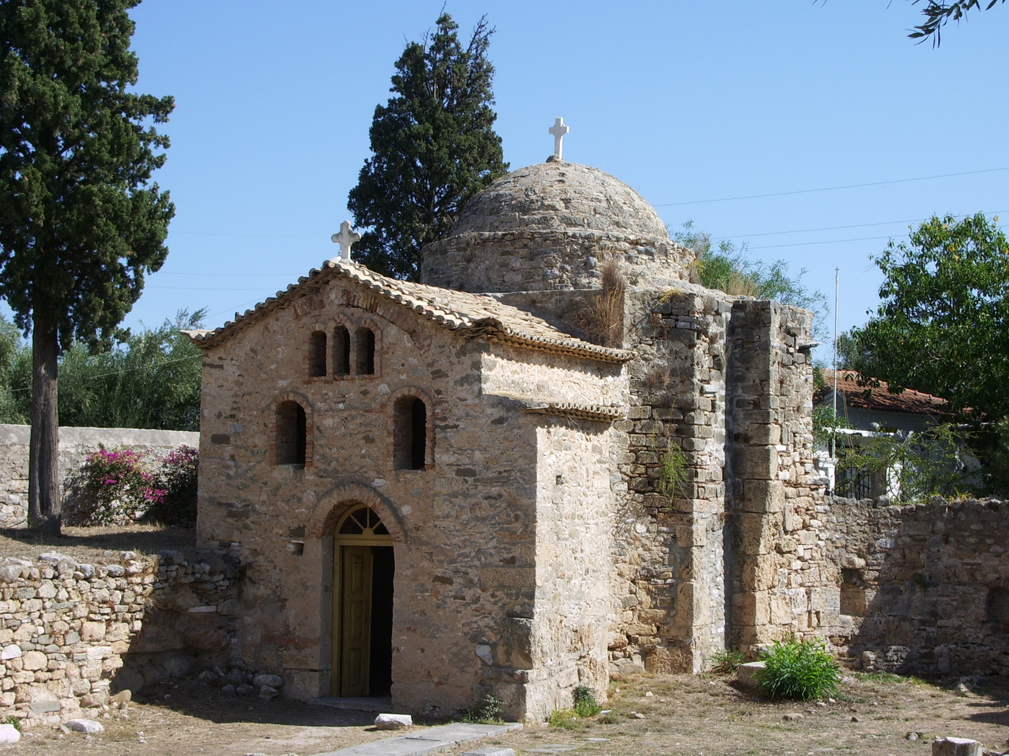 Byzantinische Kreuzkuppelkirche Agia Sophia in Koroni